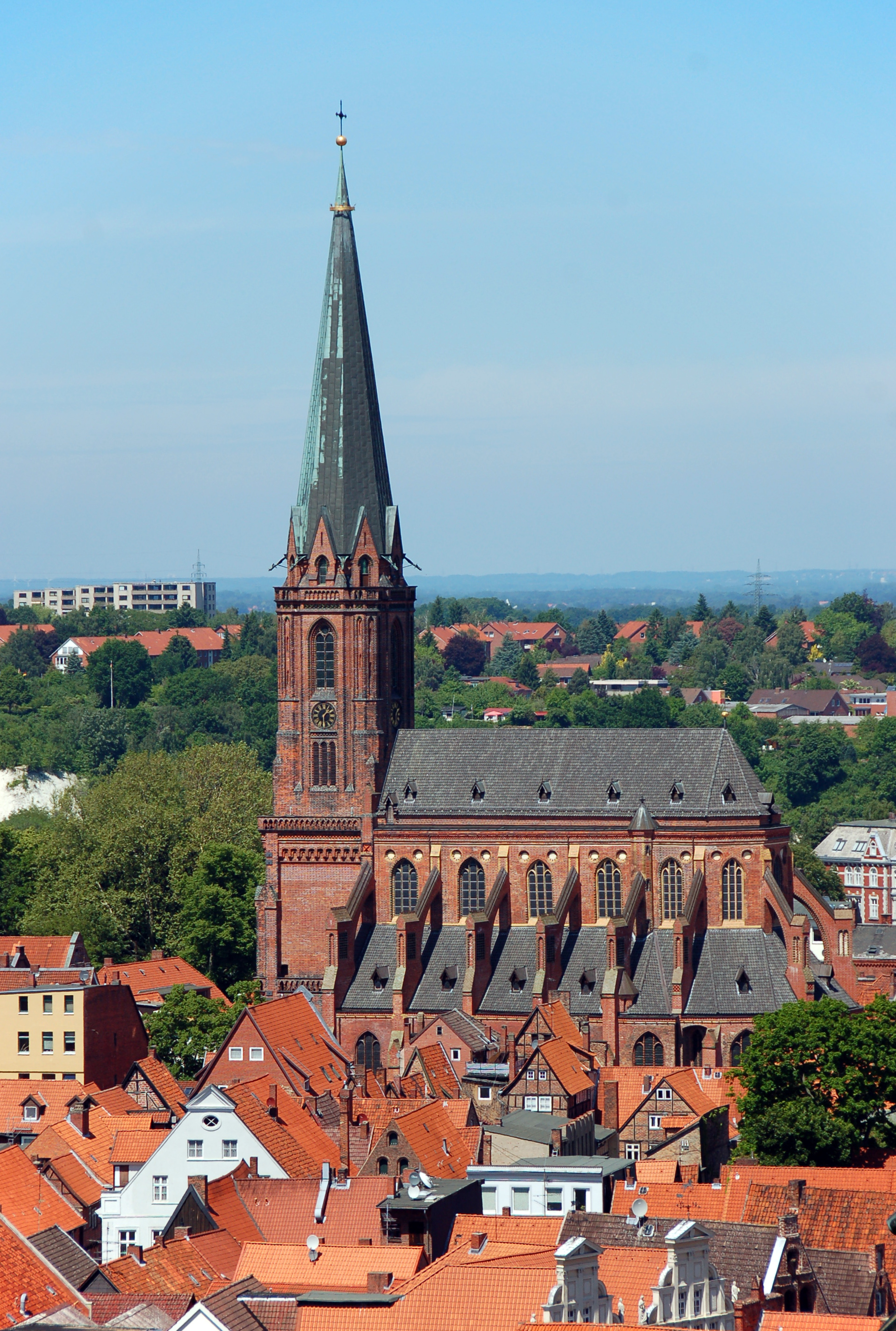 Lüneburg